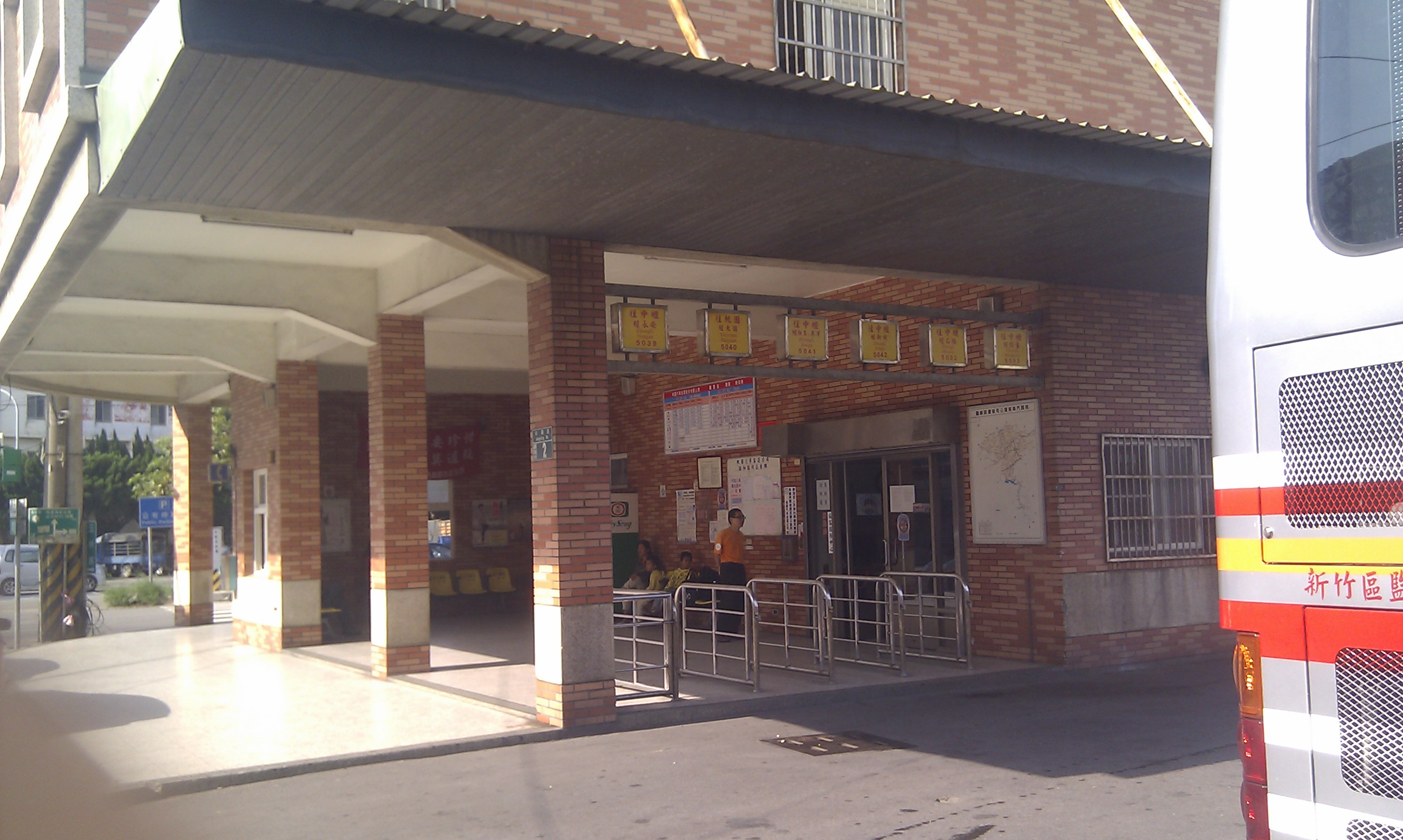 中文（台灣）: 桃園客運觀音站月台。